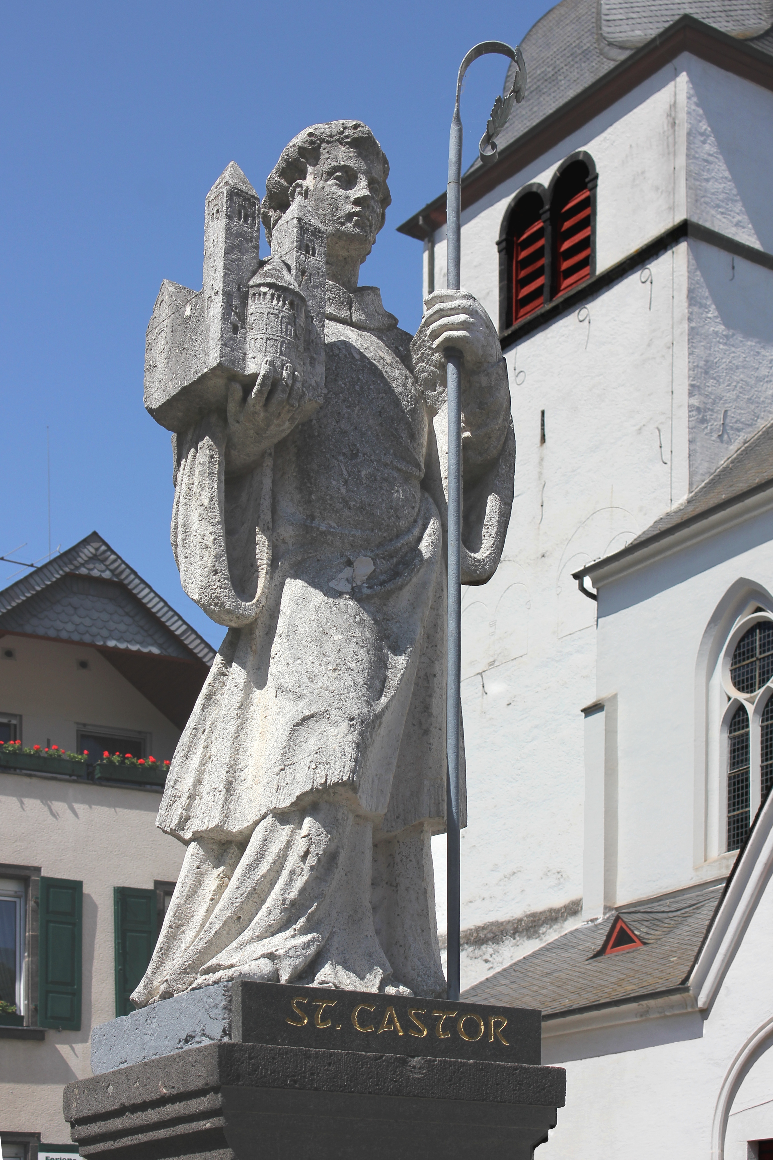 Karden, St.-Castor-Statue auf dem Castorbrunnen